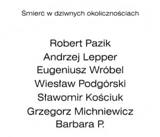 Fragment spotu Gazeta Polska Codziennie